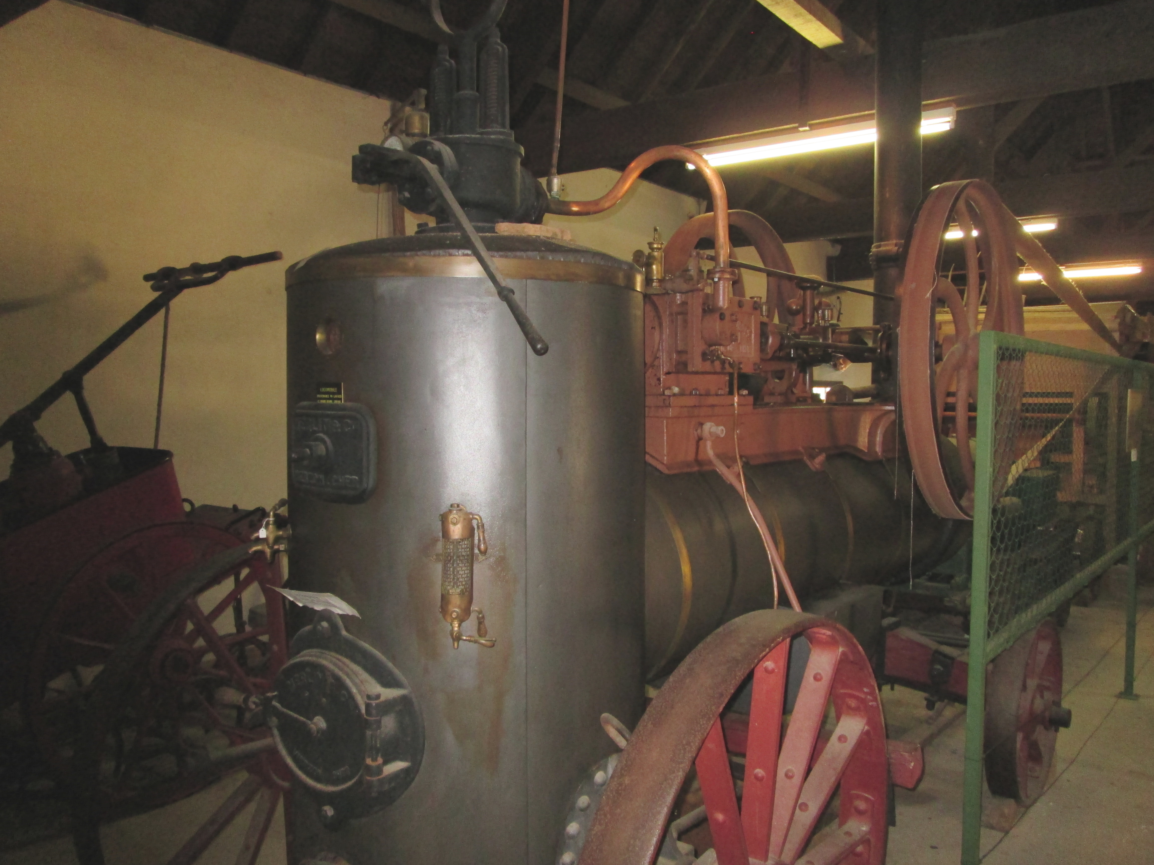 Locomobile de 1927 composée de pièces de la Société française de matériel agricole de Vierzon (SFMAI) et Merlin (Cher), en état de fonctionnement, au musée André-Voulgre (Mussidan, Dordogne, France).